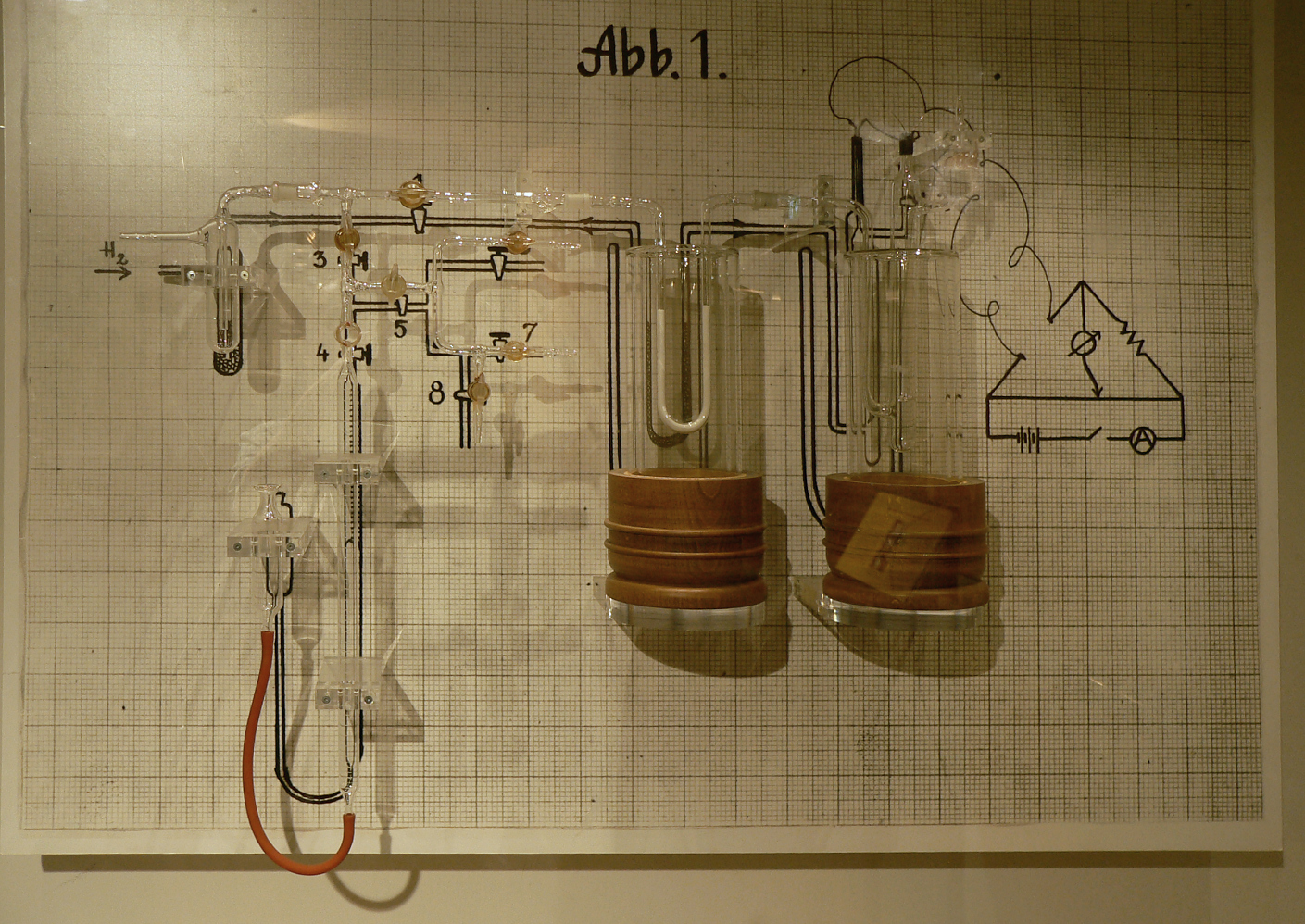 erster Gaschromatograph von 1947, Nachbau von 1995, Deutsches Museum Bonn